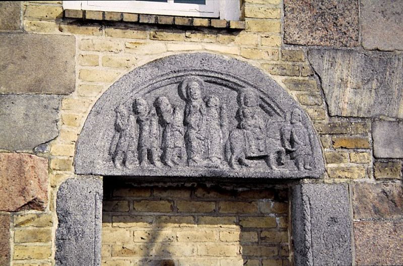 Tånum Kirke, Randers Kommune, Tympanon over sydportal